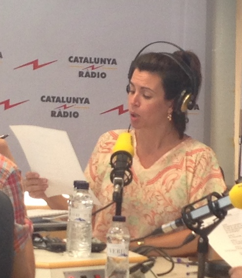 Agnès Busquets al Matí de Catalunya Ràdio